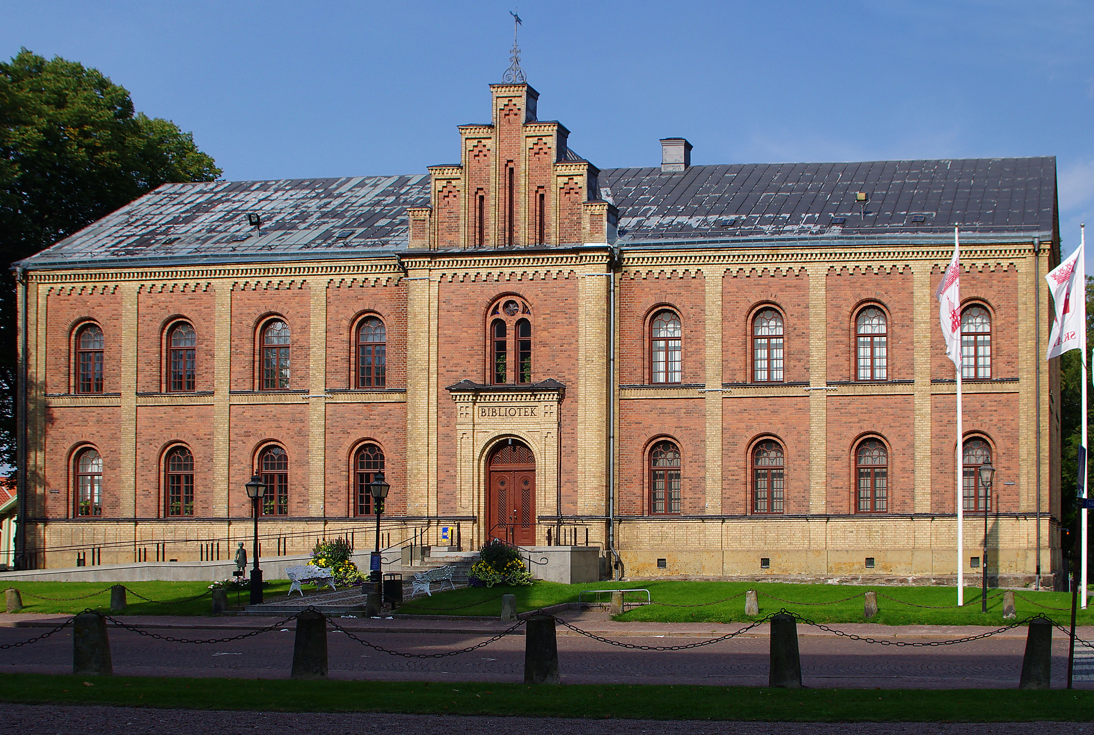 Skara stifts- och landsbibliotek i Skara i Skara kommun i Västra Götalands län, Västergötland, Sverige.